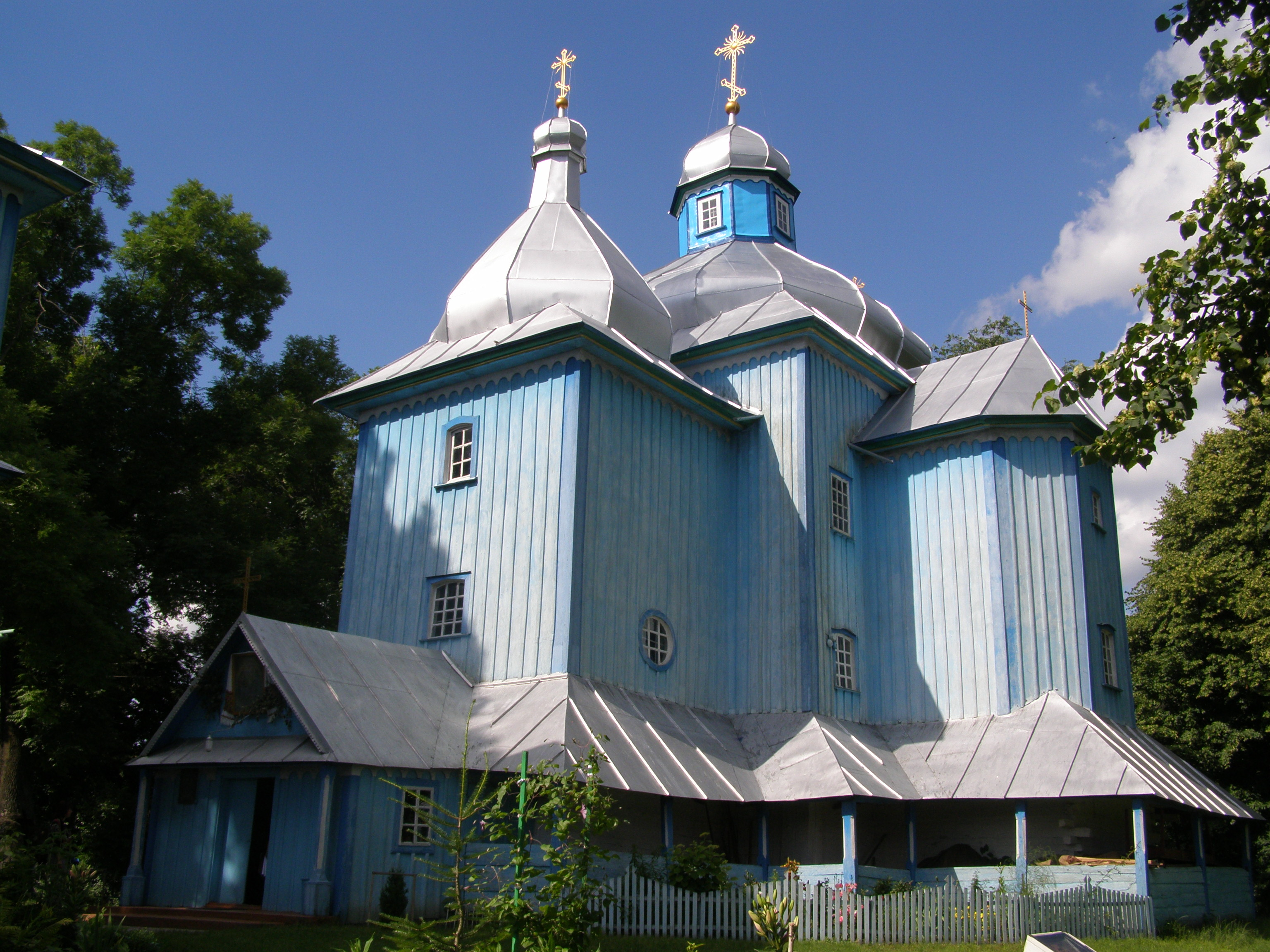 Троїцька церква (дер.), 1759р.. смт.Степань, Рівненської обл.